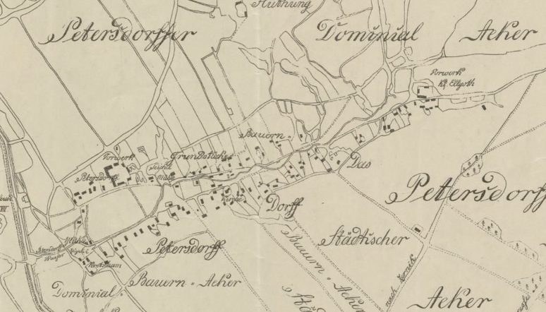 Petersdorf bei Gleiwitz im Jahr 1812. Zeichnung von 1911 nach alten Karten.